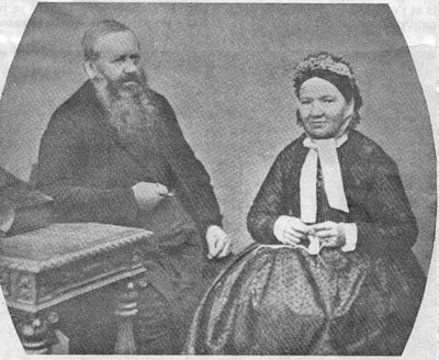 Samuel Gobat und seine Frau Marie, geborene Zeller